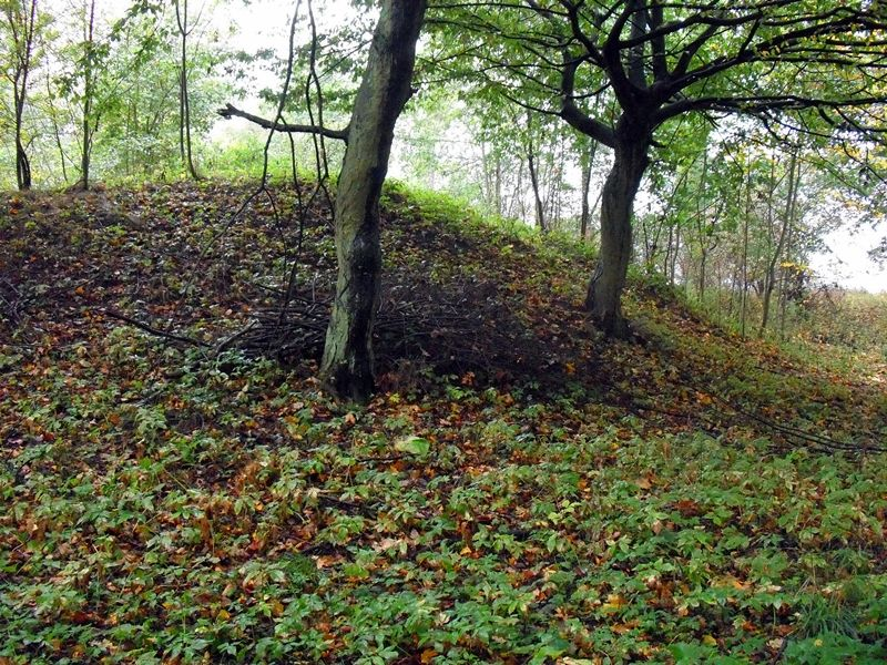 Wall der Hauptburg